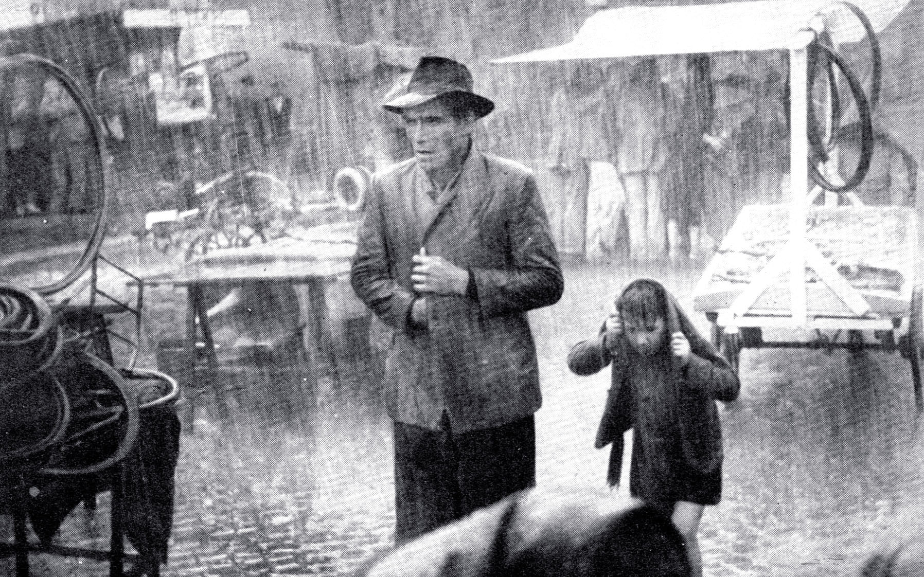 Lamberto Maggiorani ed Enzo Staiola in una scena di "Ladri di biciclette" (De Sica, 1948)